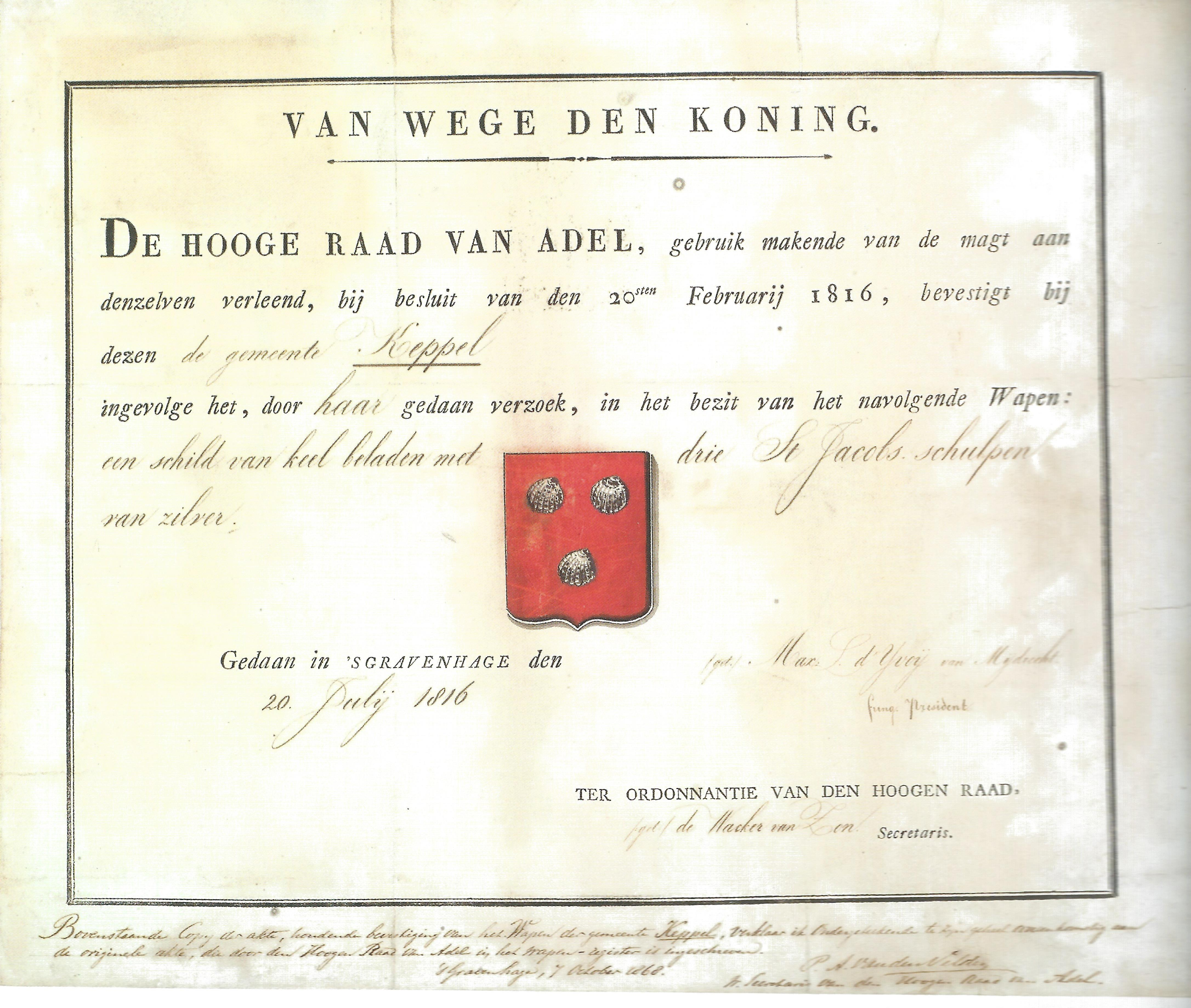 Document goedkeuring wapen gemeente Keppel HRvA (1816)